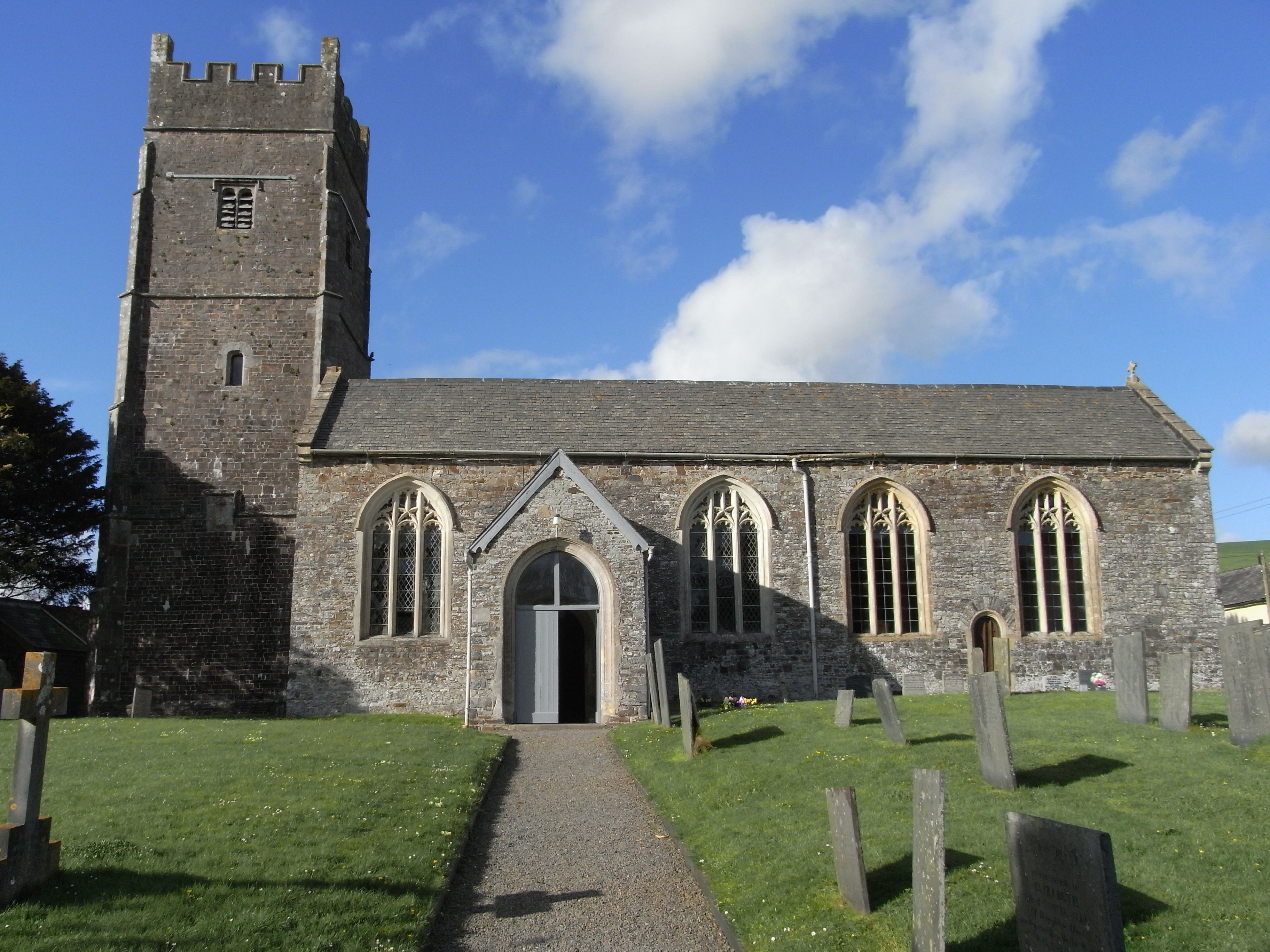 Weare Giffard Church, Devon